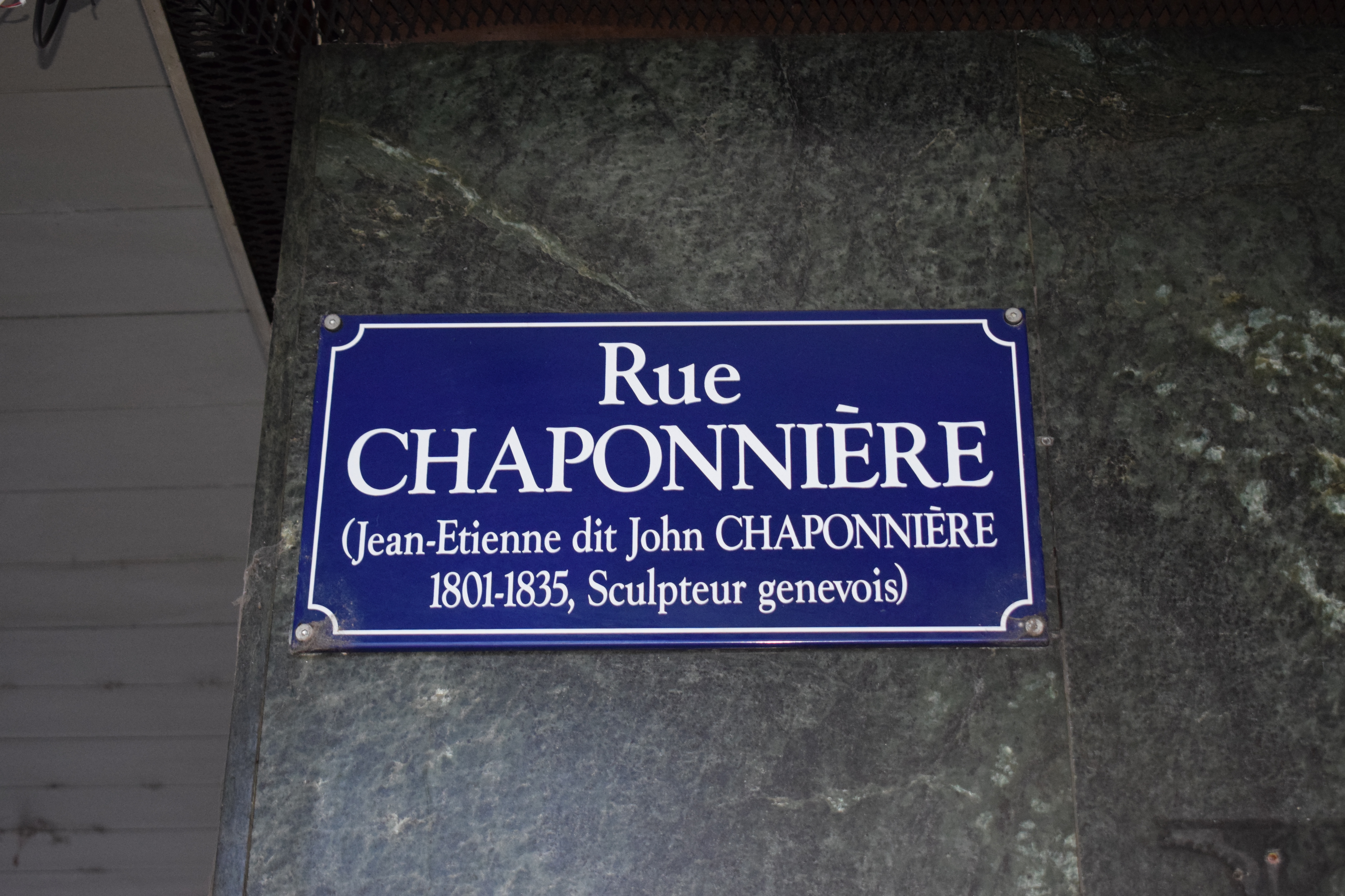 Plaque de la rue Chaponnière, à Genève, en Suisse.